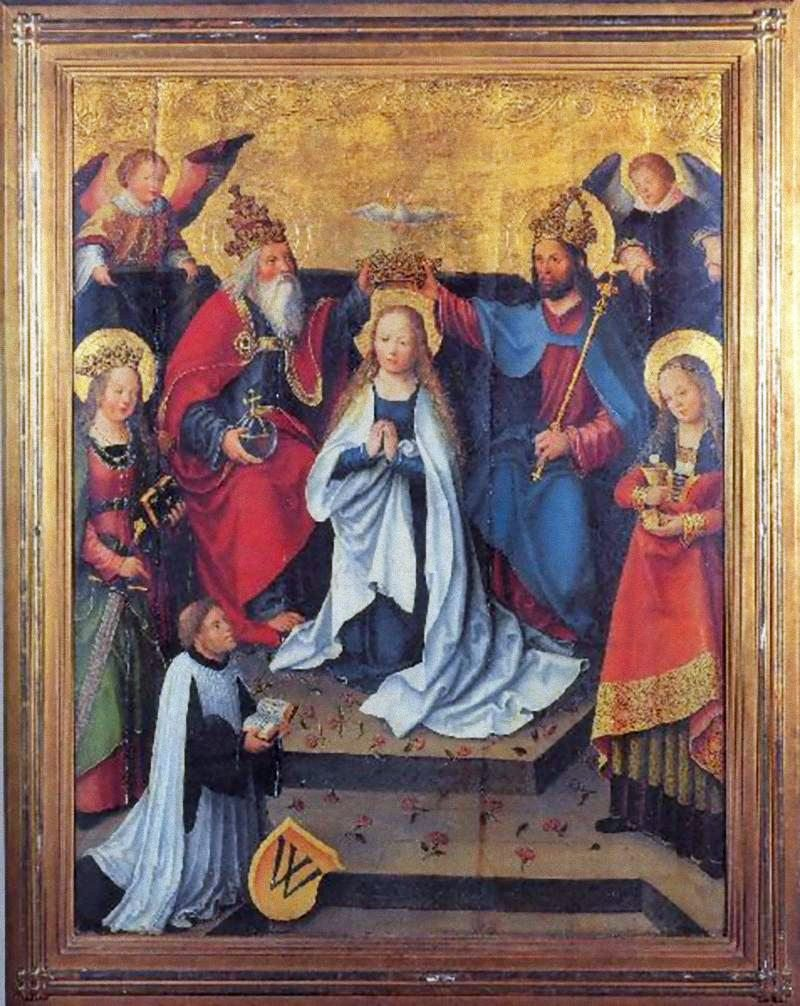 Epitaph für Nikolaus Celer